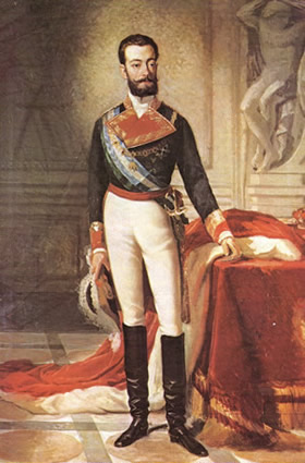 Retrato del rey Amadeo I de España (1845-1890).